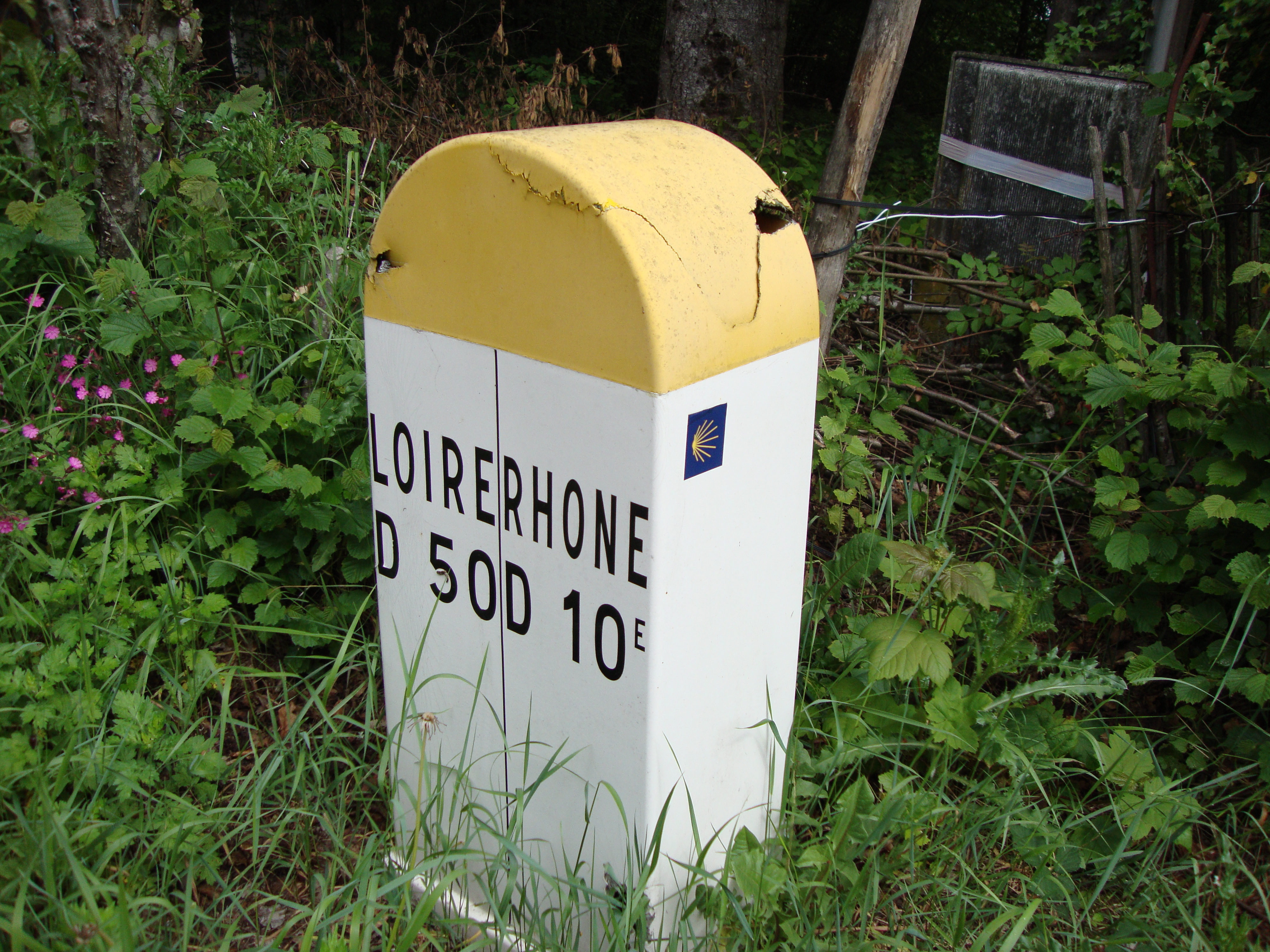 Belleroche (Loire) - Les Écharmaux (Rhône), borne entre départements, balisage St.Jacques.